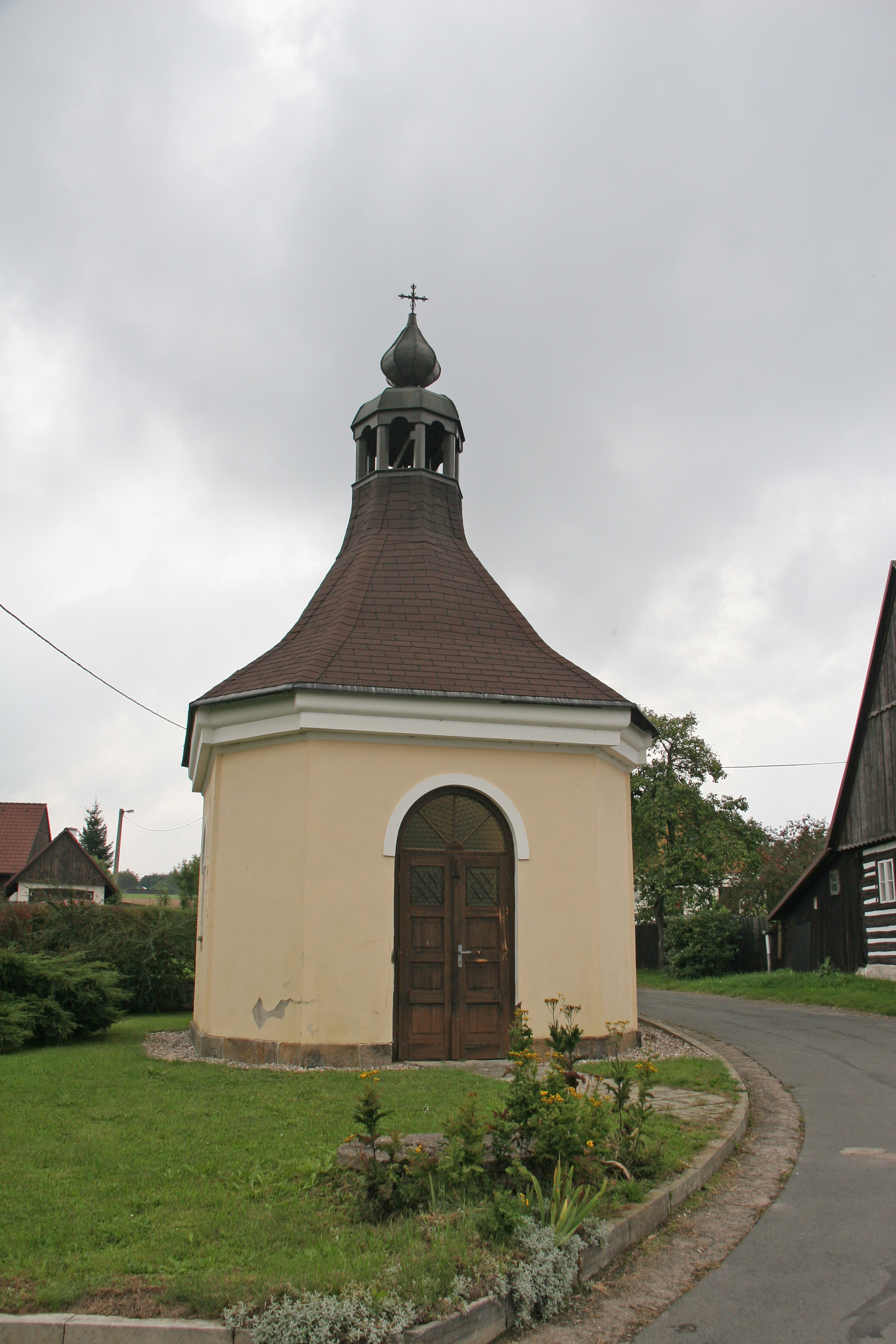 Malá Bukovina kaple